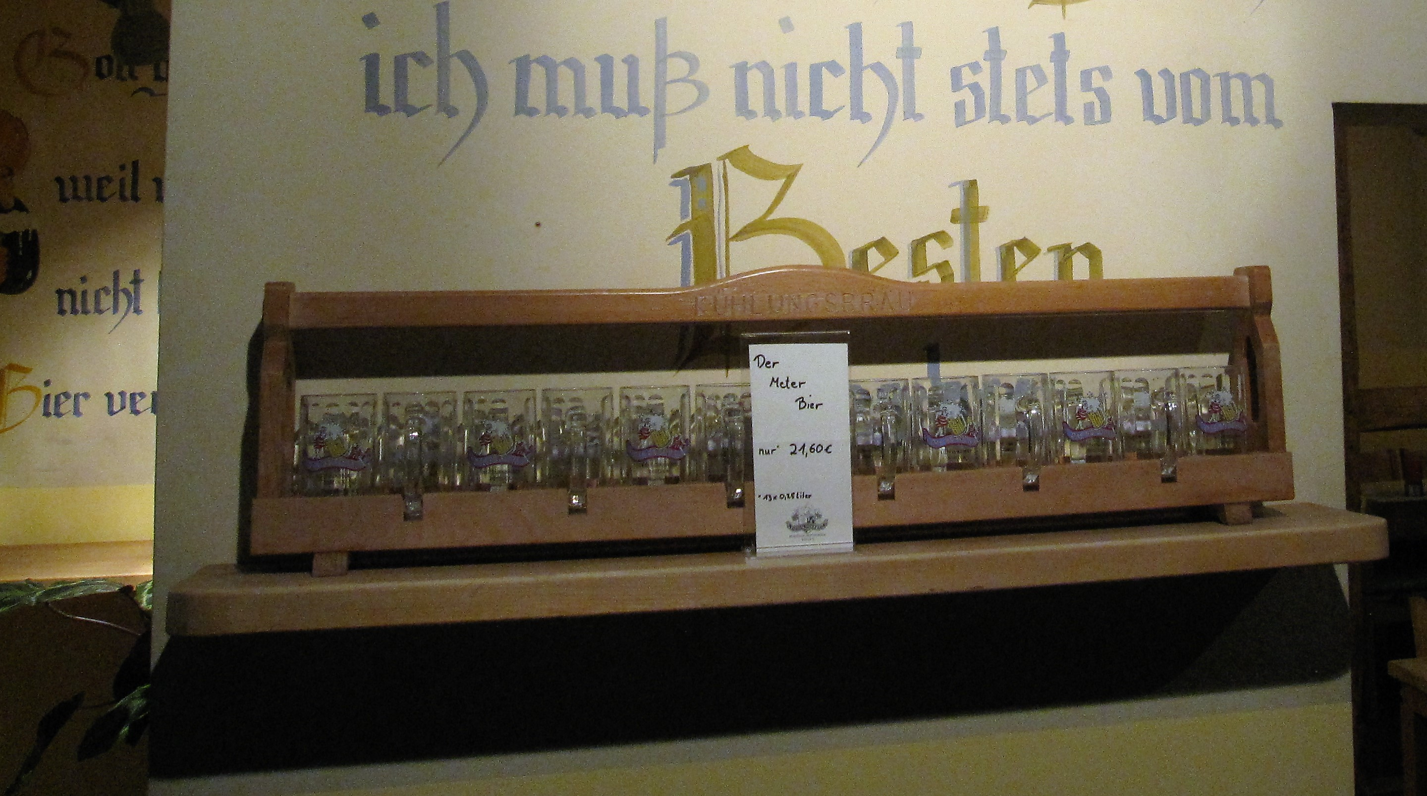 Meterbier – Bierglasträger bzw. kurz Bierträger aus Holz, mit 13 Biergläsern (Bierkrüge) á 0,25 Liter. Hier als „Werbung“ in einer Gaststätte in Rostock.